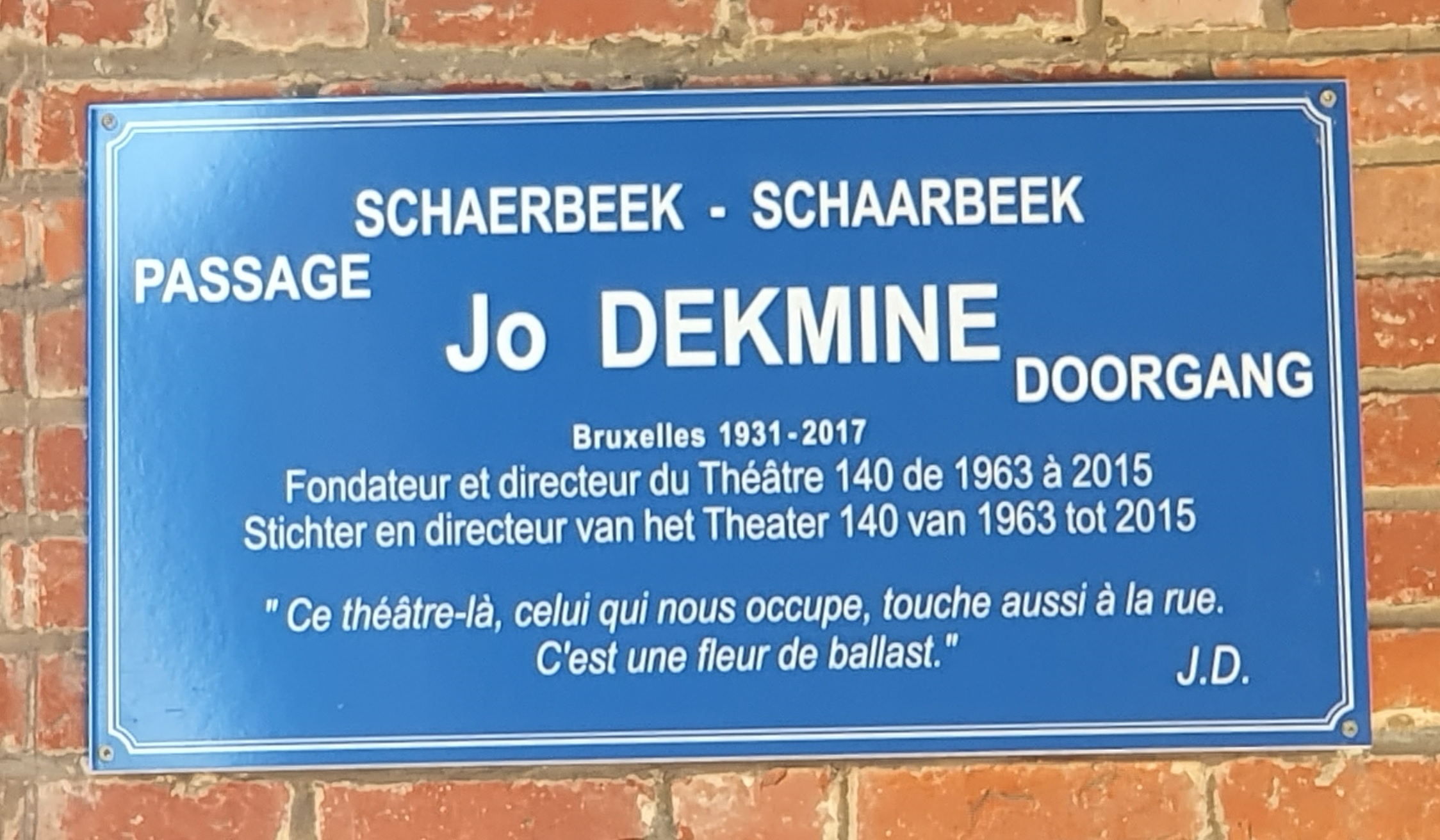 Le Passage Jo Dekmine, avenue Eugène Plasky à Schaerbeek, Bruxelles, Belgique.